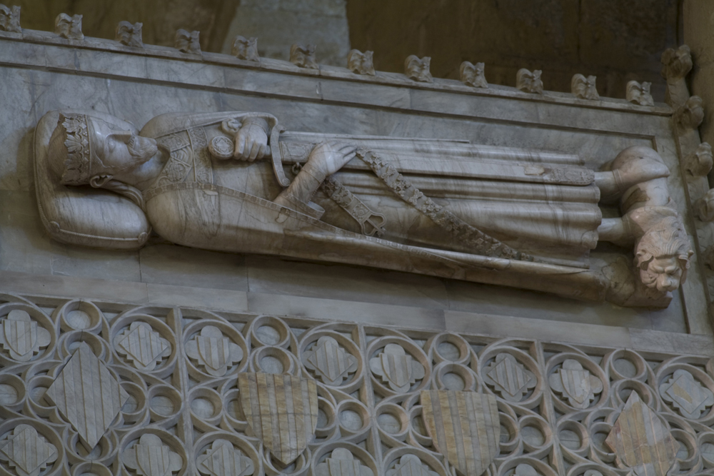 Jaume el Conqueridor